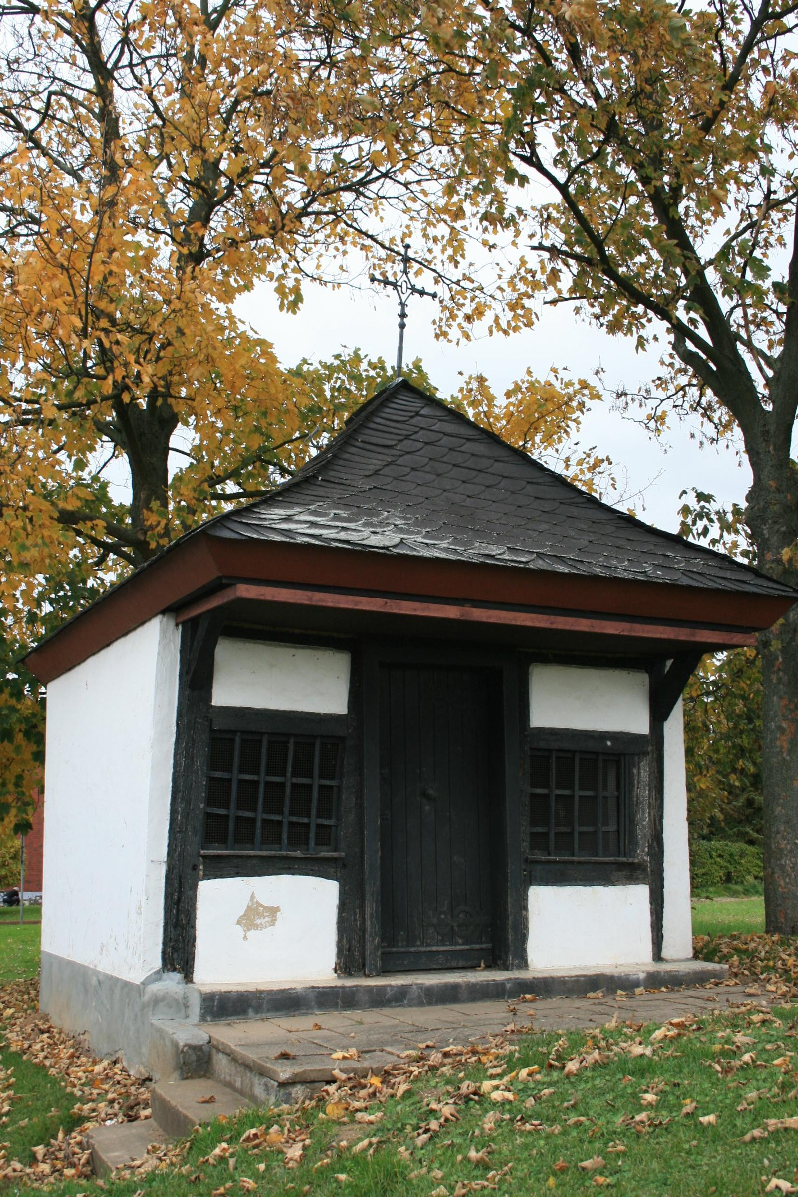 Das Heiligenhäuschen St. Brigida am Ortsausgang Gymnicher Str. in Nörvenich-Wissersheim